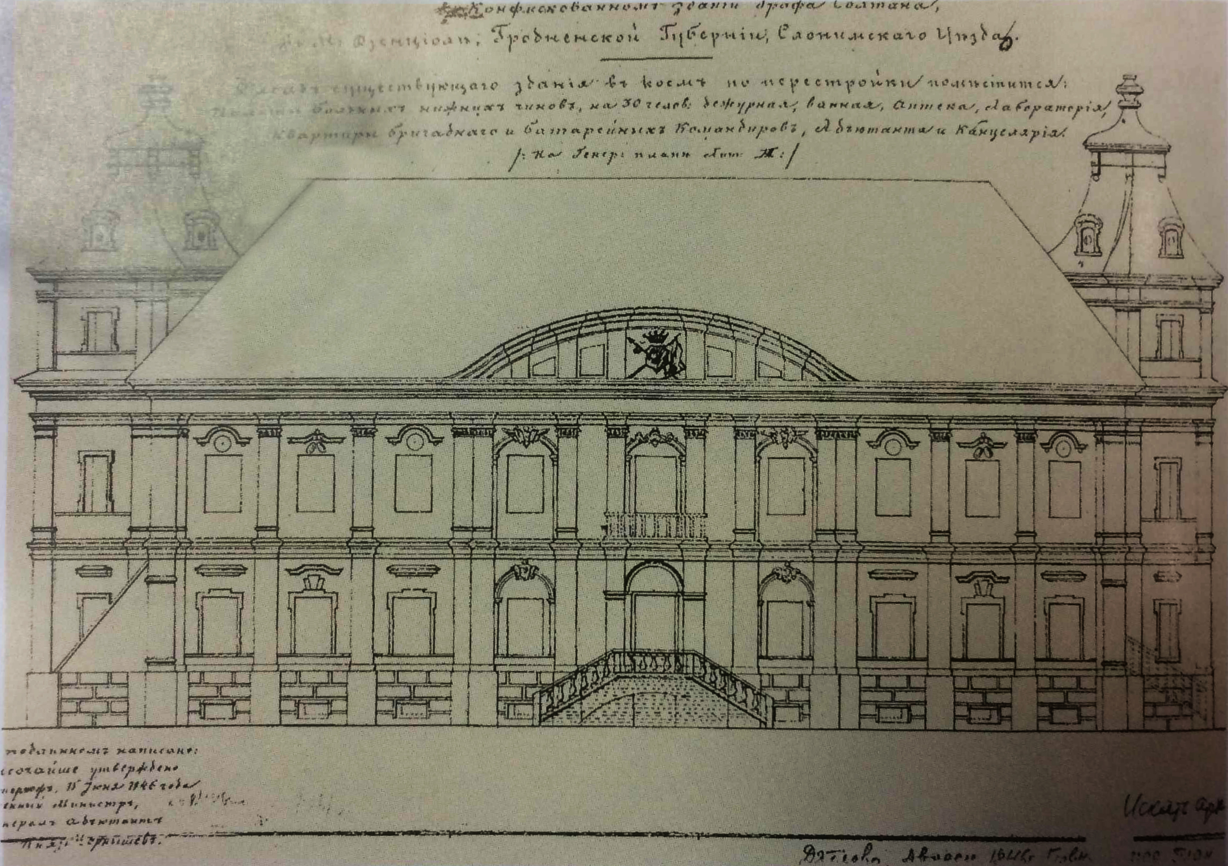 Беларуская (тарашкевіца): Зьдзецел (Ździecieł), палац Радзівілаў (Radzivił)